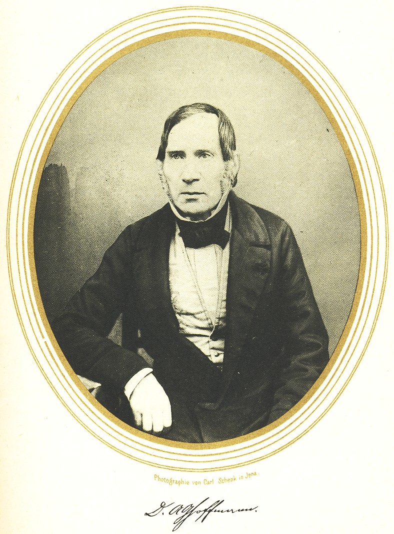 Porträt des Theologen Andreas Gottlieb Hoffmann; Fotografie von Carl Schenk (1813–1874)